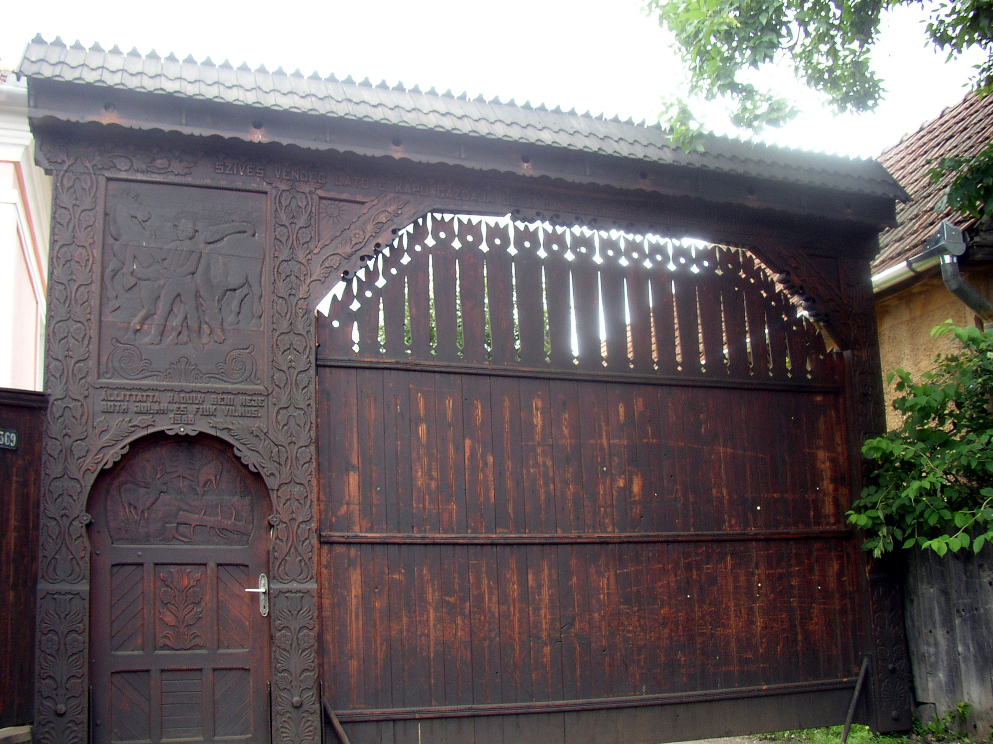 Székelykapu Madéfalván.